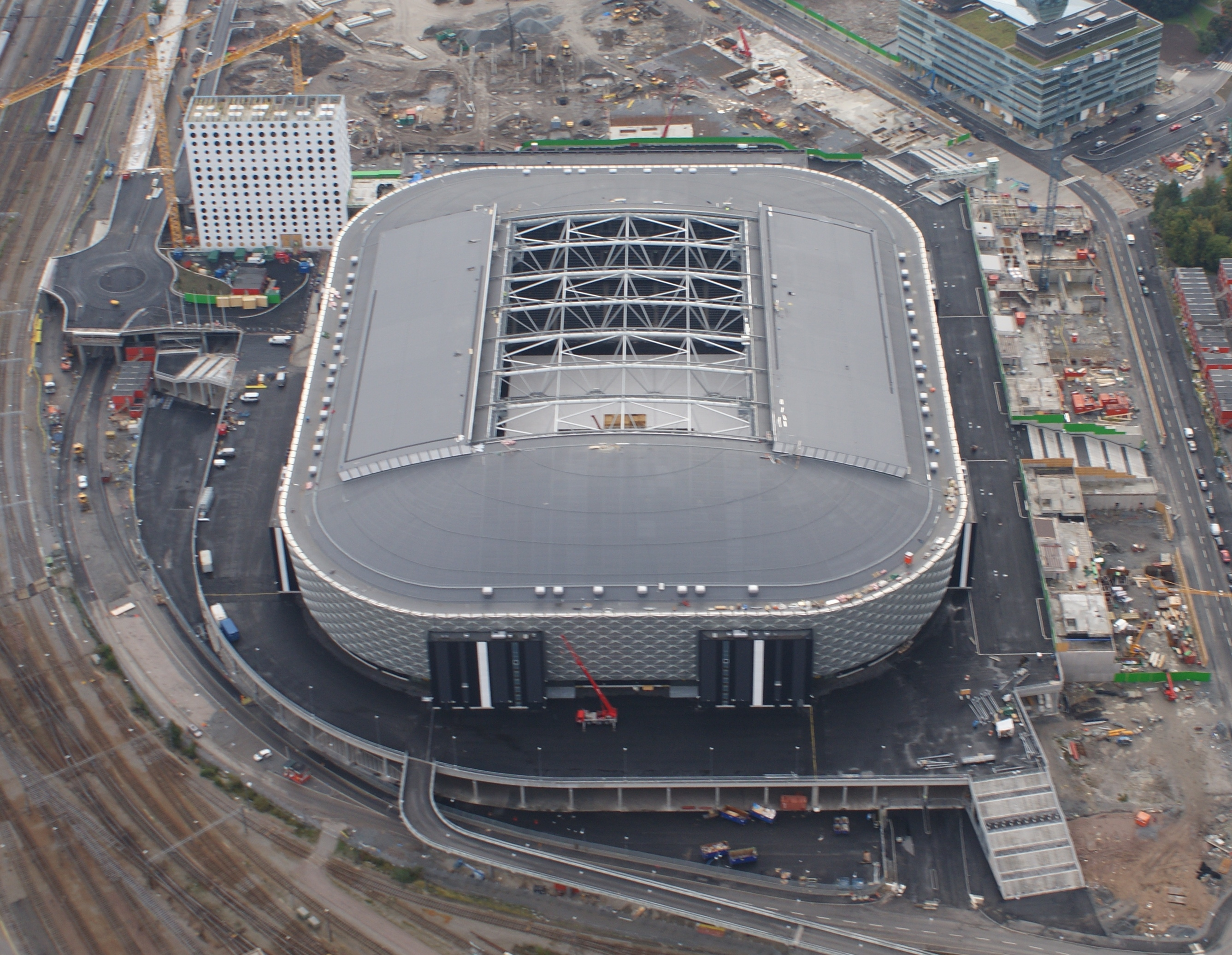 Friends arena sedd från helikopter.